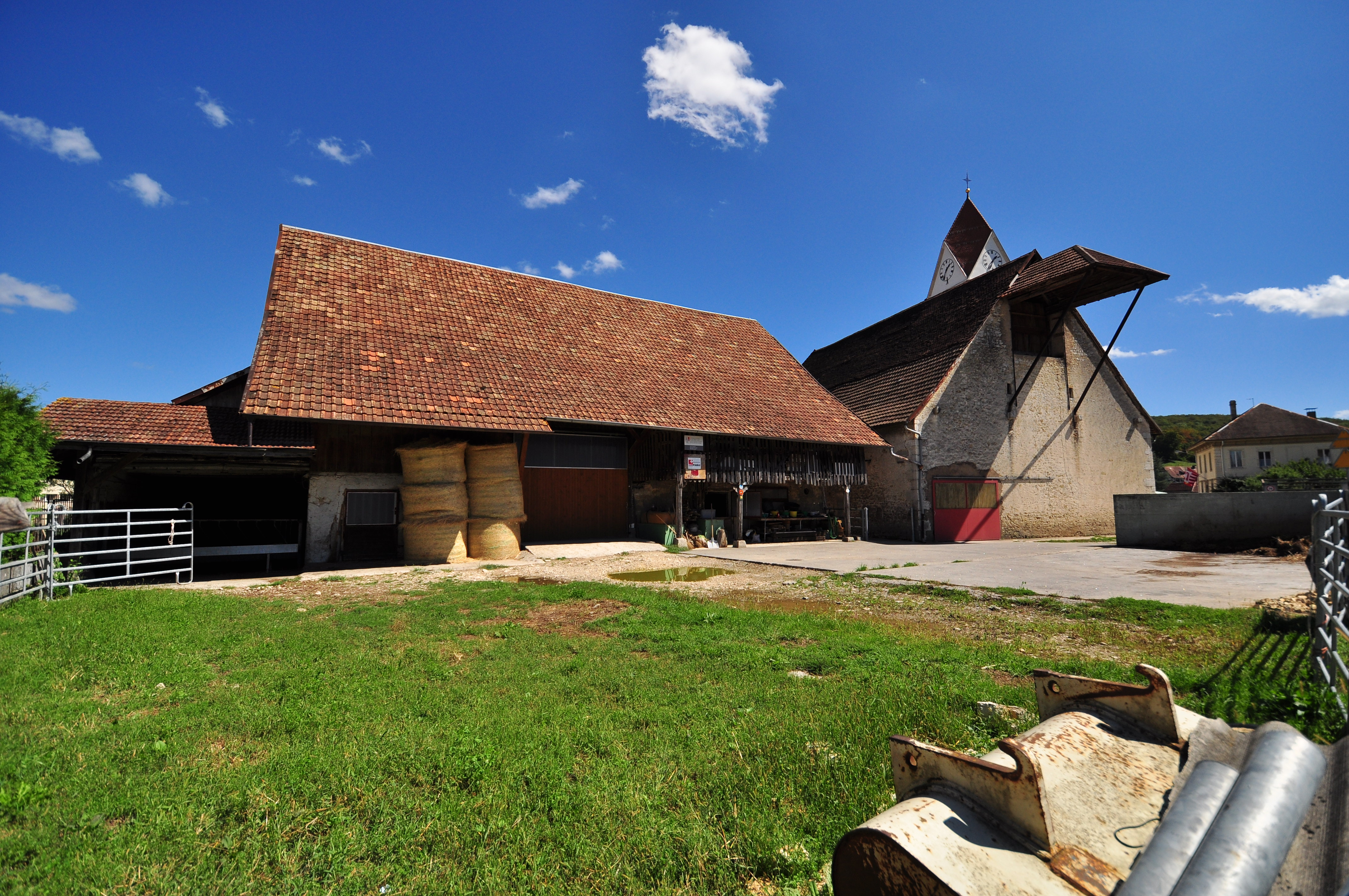 Ferme Chavon-Dessous